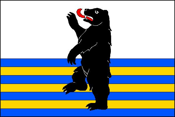 Vlajka obce Horní Pěna